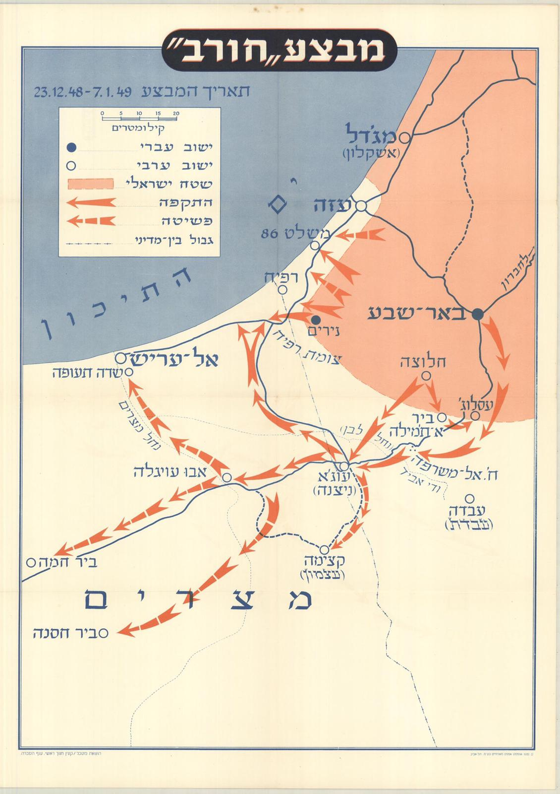 מבצע חורב.